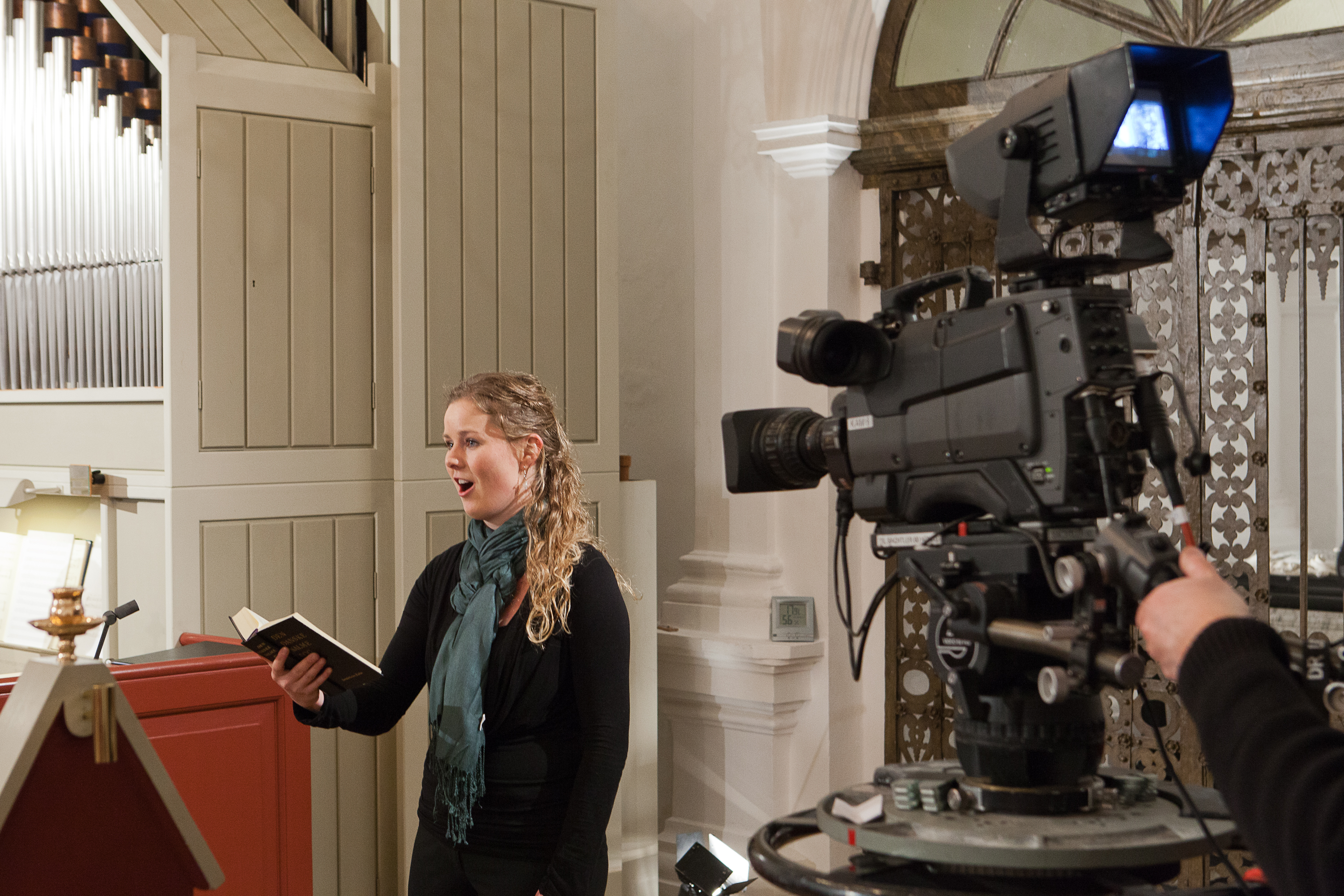 Optagelser til DR Kirken i Sønderholm Kirke.